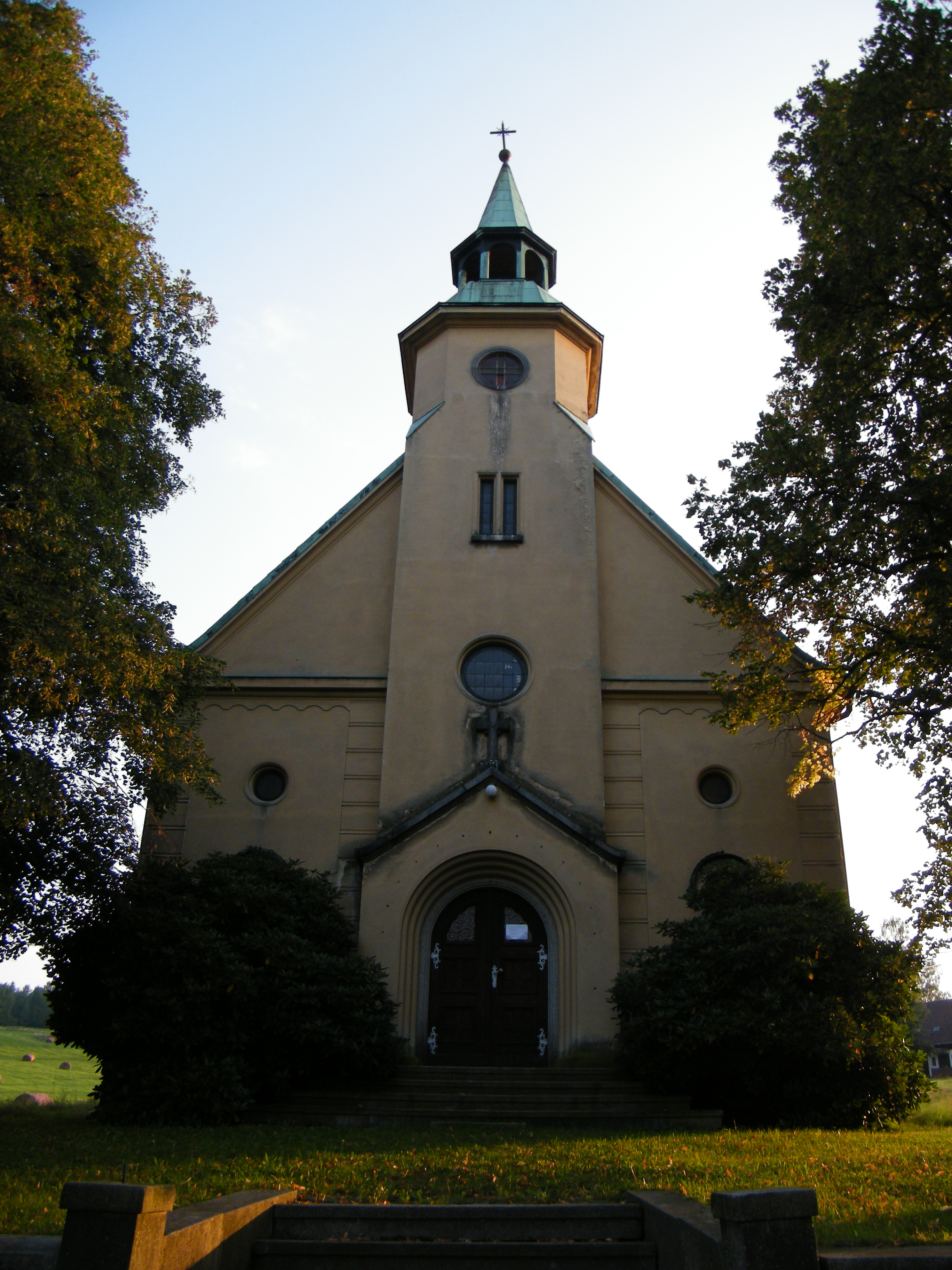 Kaple svatého Jana Křtitele v Rožanech